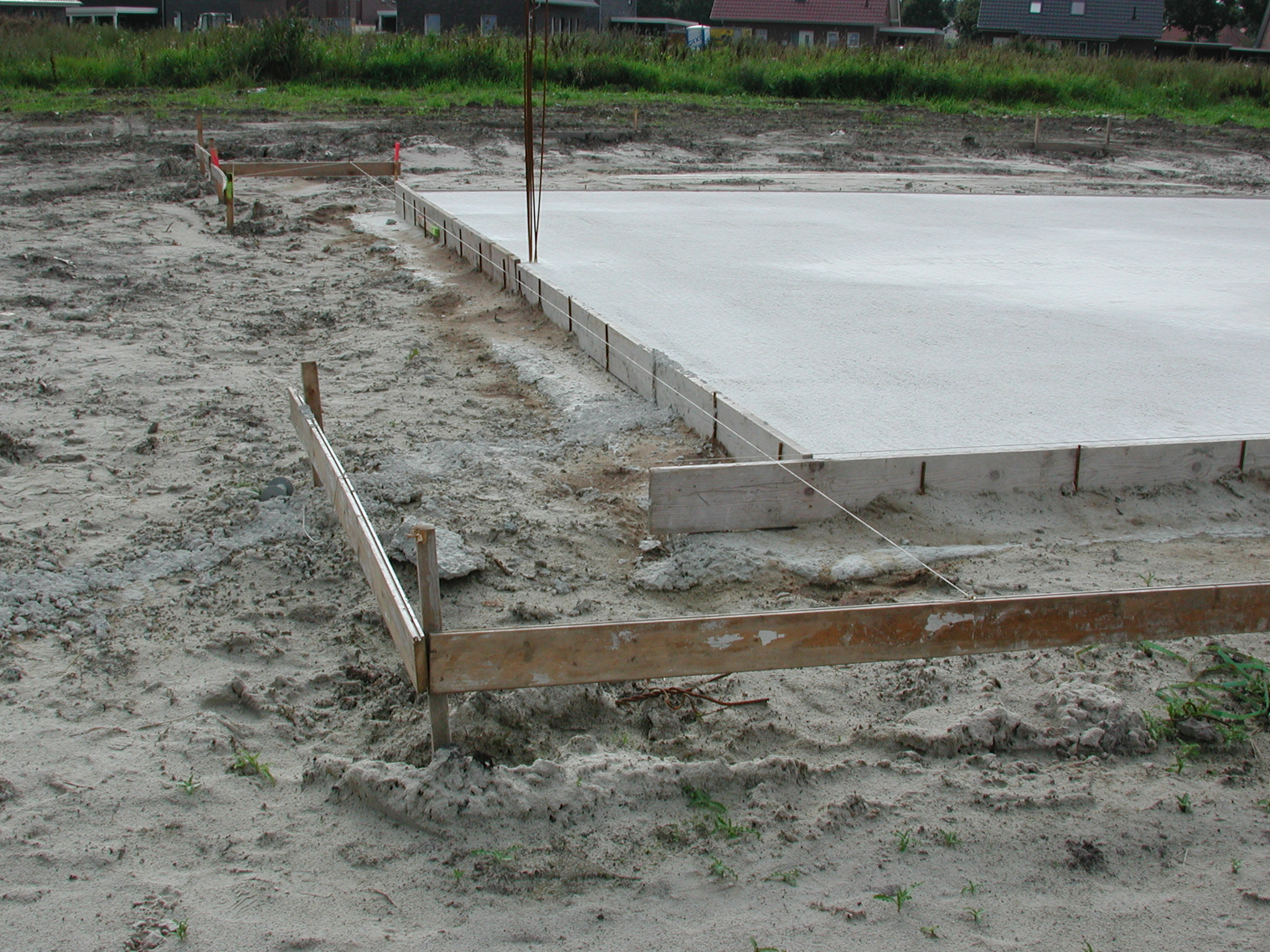 Schnurgerüst auf einer Baustelle für ein Doppelhaus in Emden.